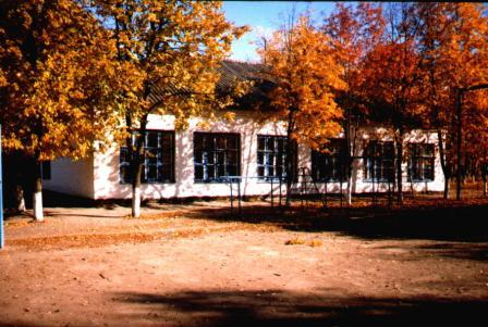 стара школа